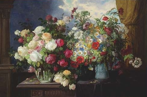 Grosses Blumenstilleben